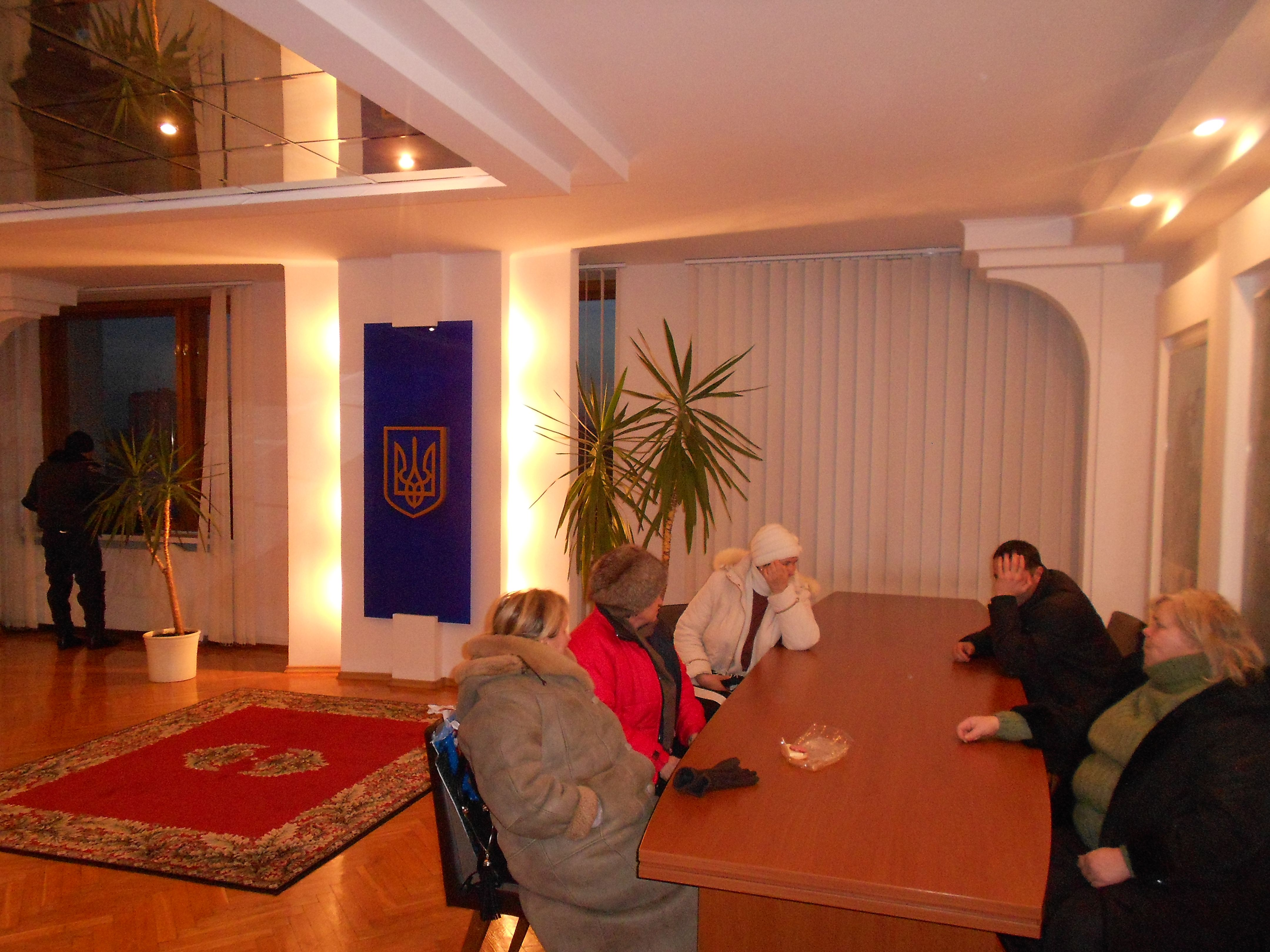 Чернігівська обласна рада 27 січня 2014 року. Всередині прибічники Євромайдану.